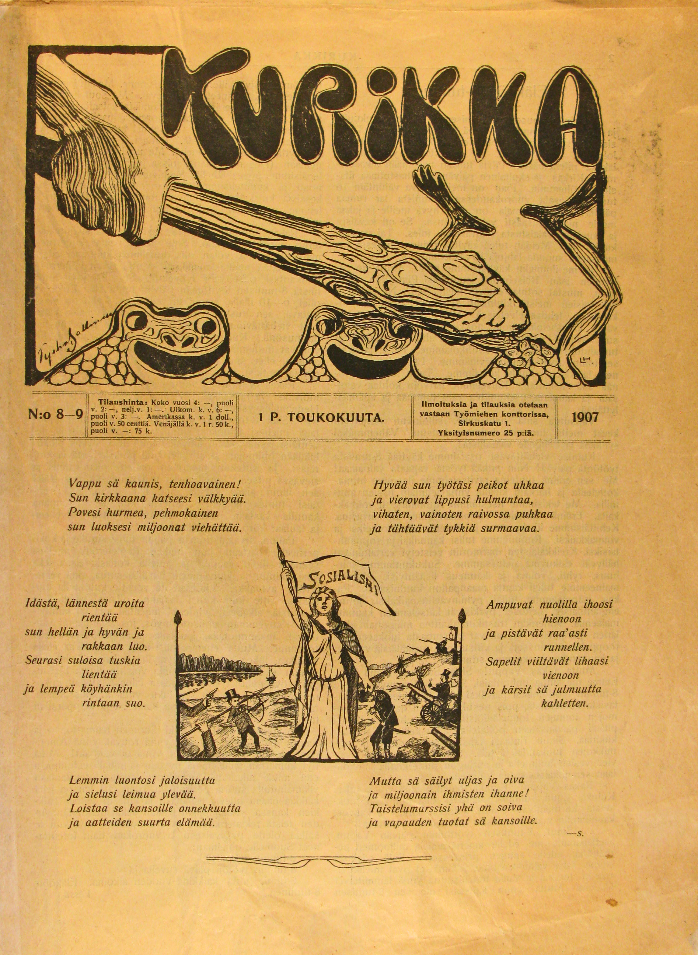 Pilalehti Kurikka 1907: No 8-9.